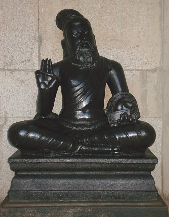 திருவள்ளுவர் சிலை